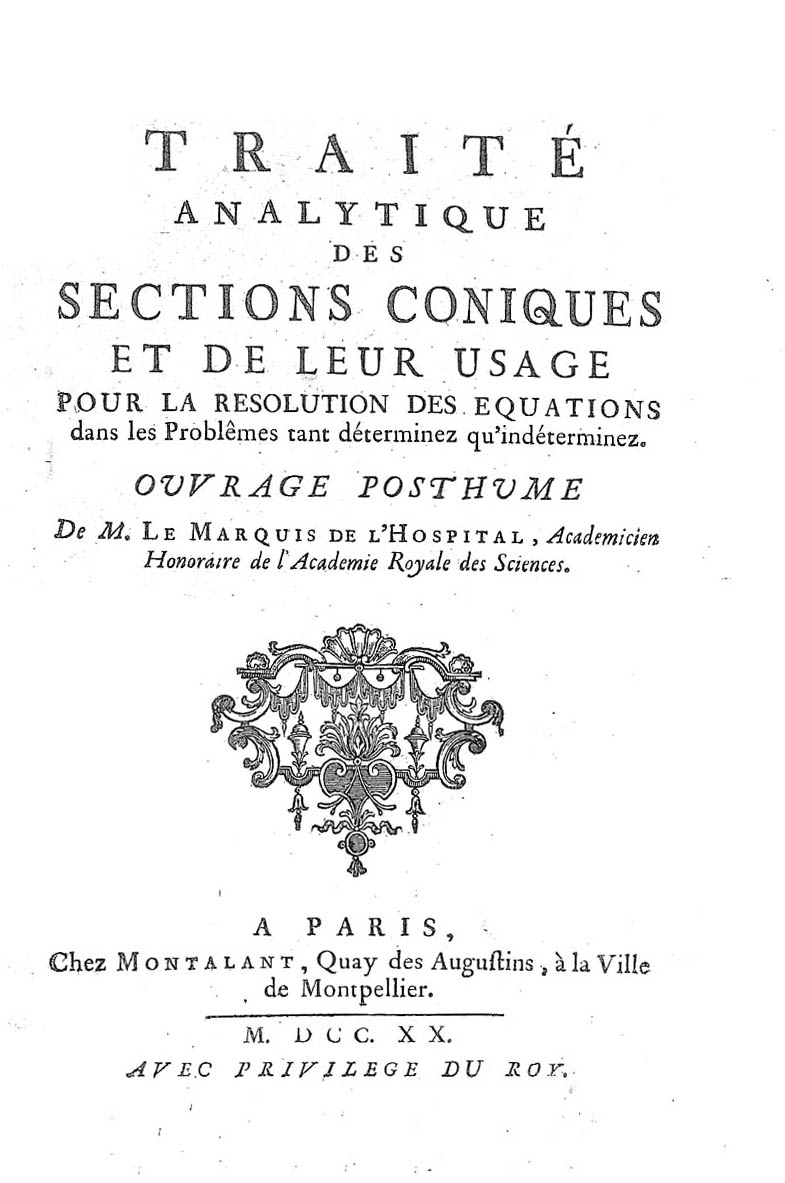 Traité analytique des sections coniques et de leur usage pour la resolution des equations dans les problemes tant déterminez qu'indéterminez. Ouvrage posthume de m. le marquis de L'Hospital .... - A Paris : chez Montalant, quay des Augustins, a la ville de Montpellier, 1720. - [8], 459, [1] p., 33, [1] c. di tav. ripieg. : ill. calcogr. ; 4º .